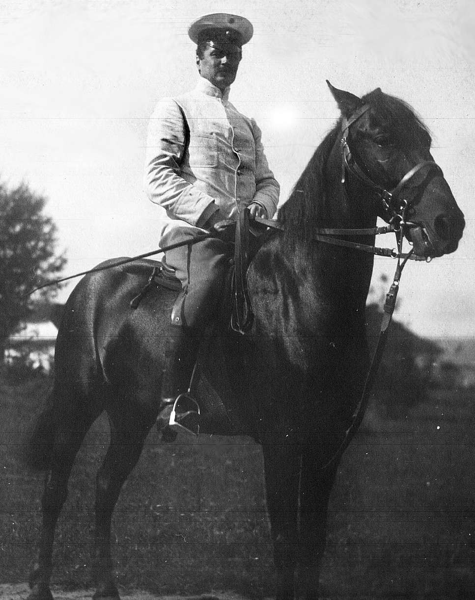 Вацлаў Мікалай Радзівіл